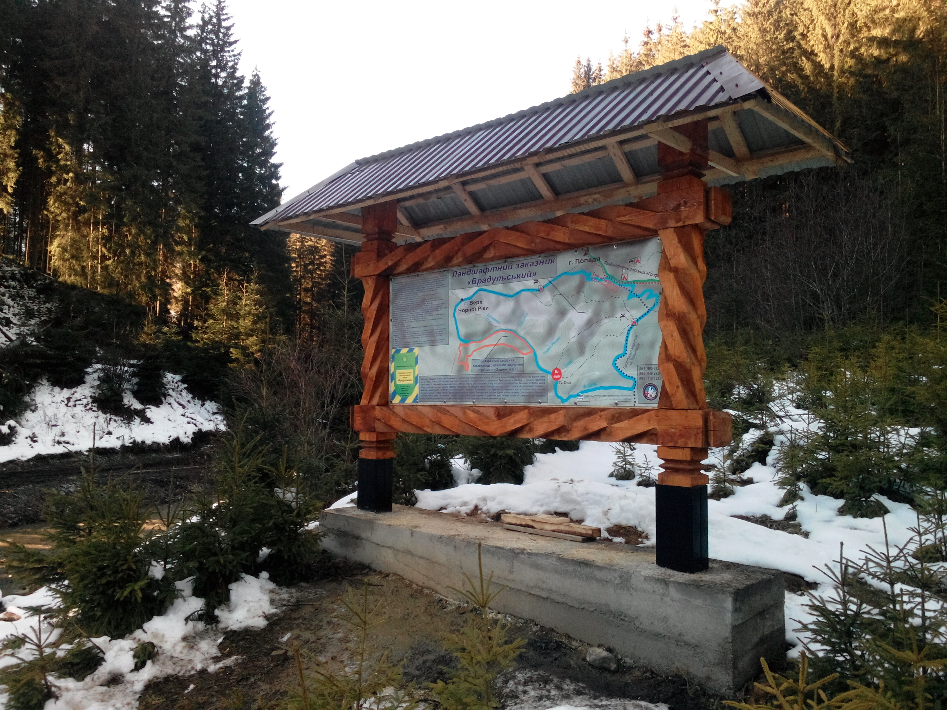 Встановлений в ур. Став